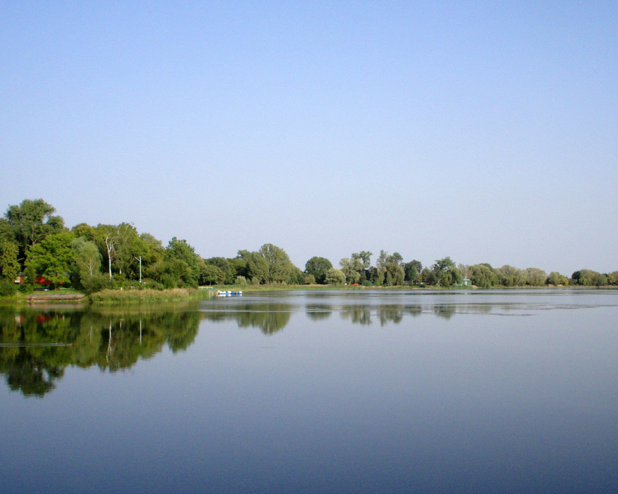 Elsterstausee, Stausee Bösdorf